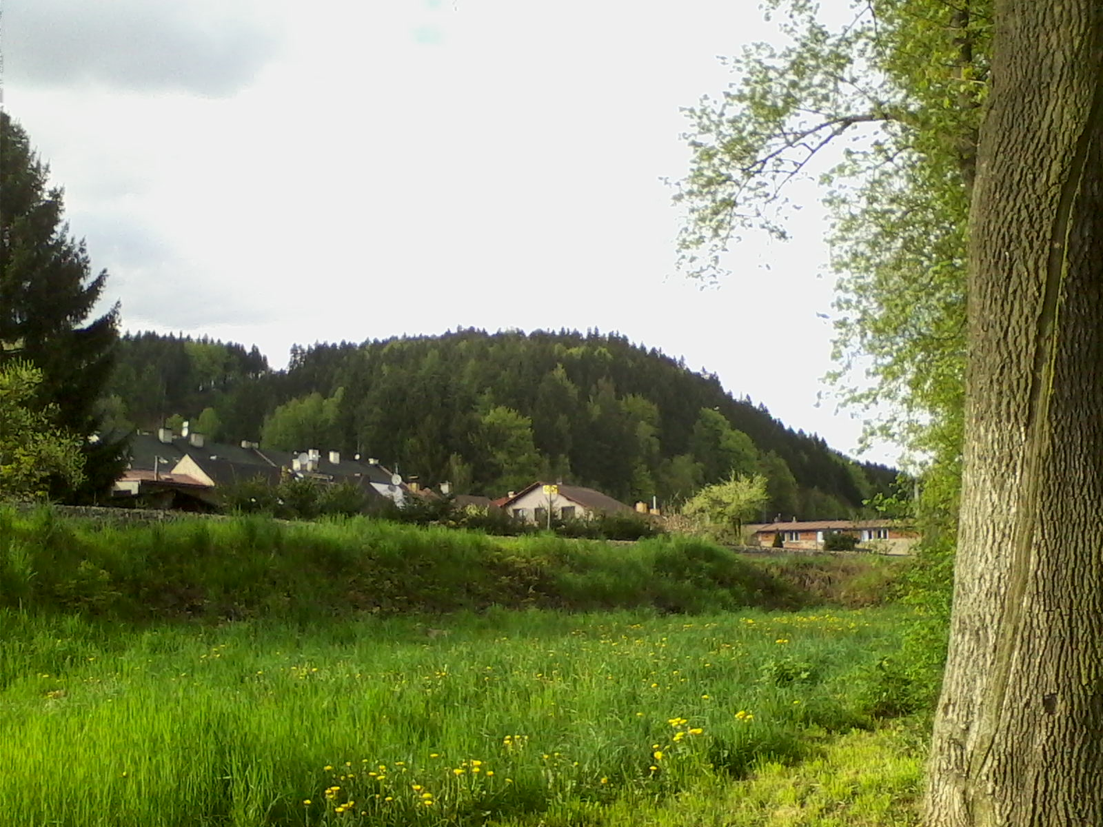 Pohled na Jírovu horu od jihovýchodu.